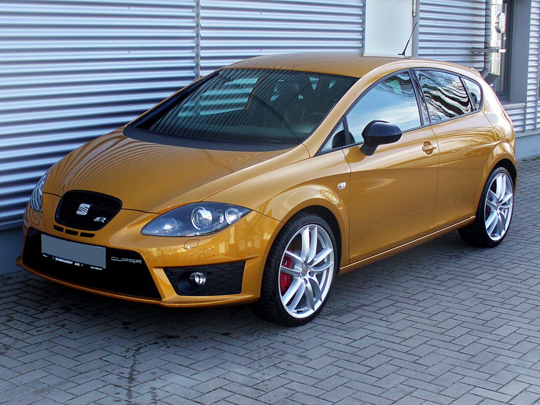 Seat Leon Cupra R